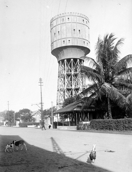 Repronegatief. Watertoren te Medan